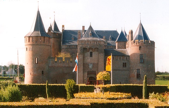 Muiderslot Categorie:Afbeelding kasteel